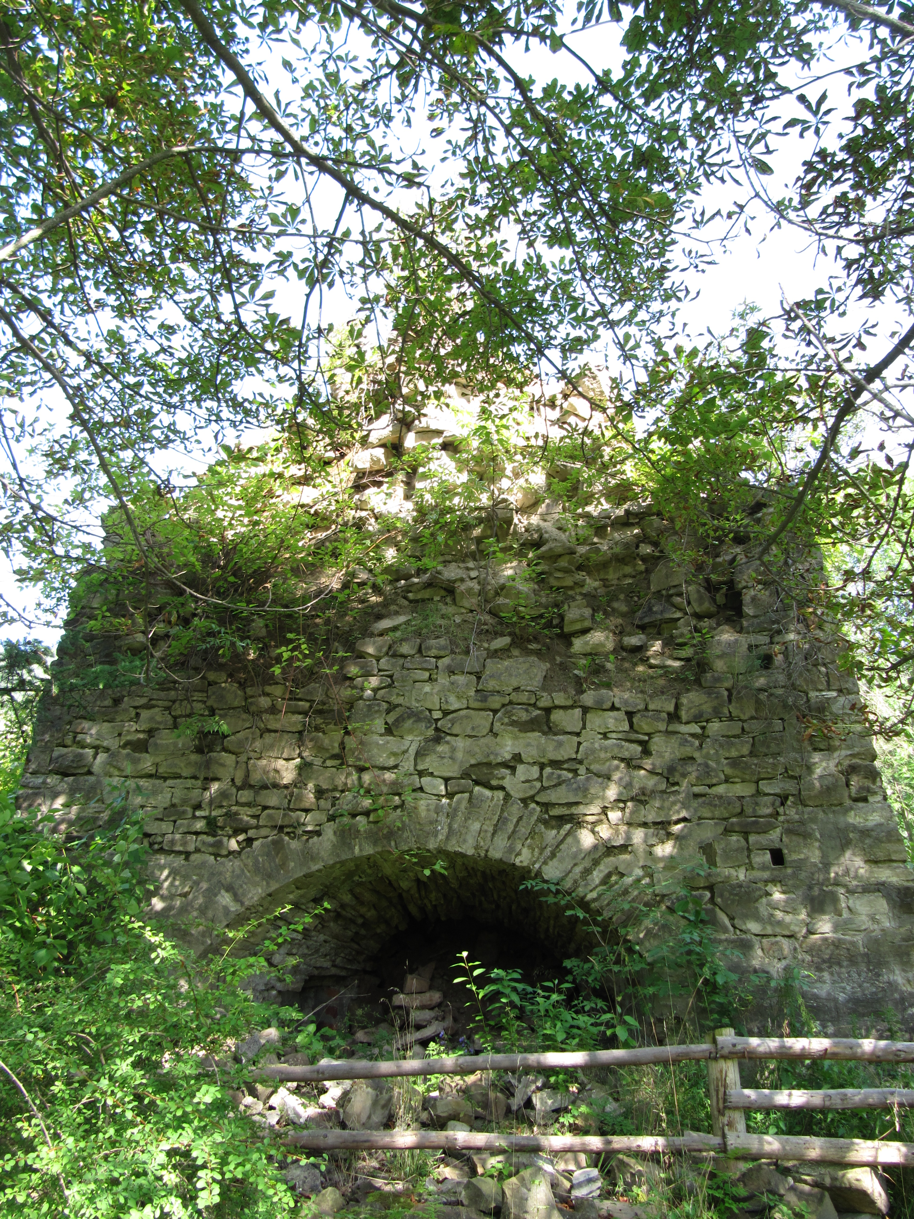 Гута (мур.), с. Майдан